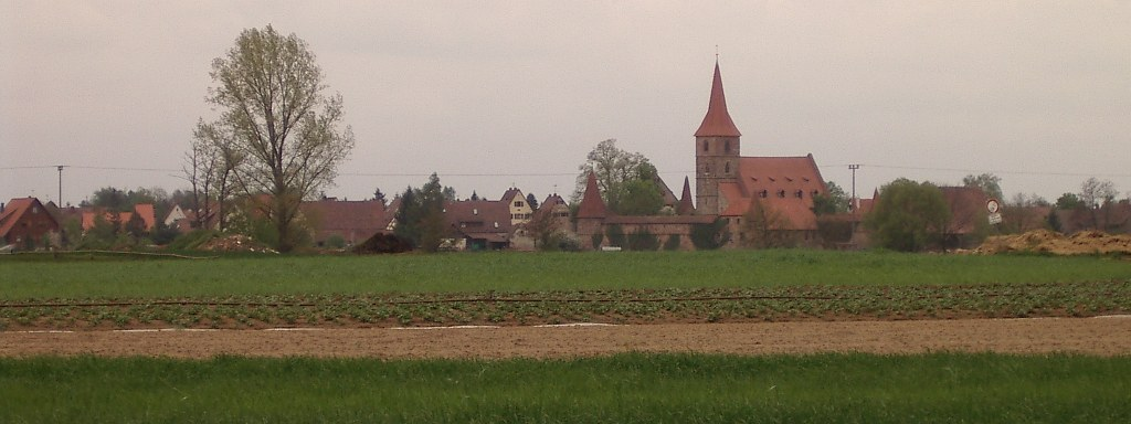 Beschreibung Kraftshof, Stadtteil von N?rnberg, von NO (01.05.2004). Quelle Fotographie 01.05.2004 Fotograph --Keichwa Copyright Status GNU Freie Dokumentationslizenz Ansicht der Ortschaft von NO mit Wehrkirche. Im Vordergrund Gem?sefelder des Knoblauchslands. Details